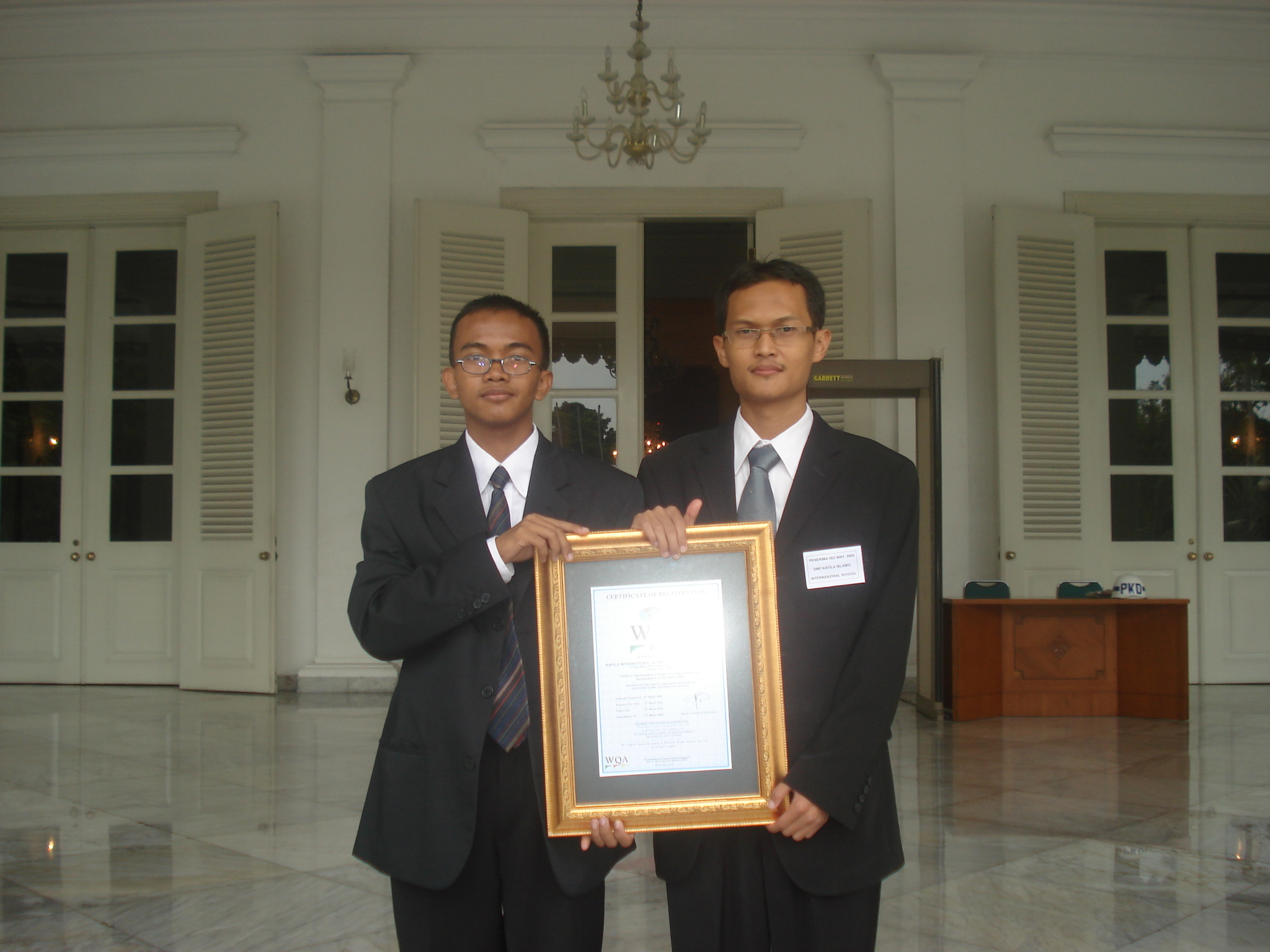 Foto Penyerahan Sertifikat oleh Gub Fauzi Bowo